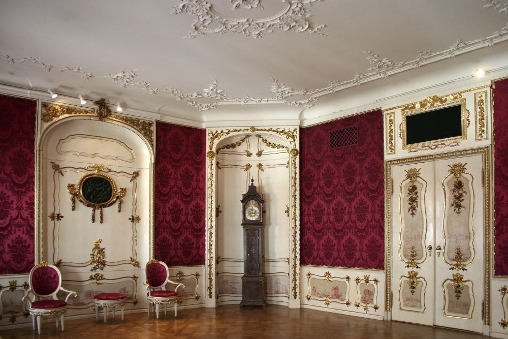 Salon – reprezentacyjne wnętrze położone na pierwszym piętrze kamienicy od ulicy Długiej. Fot. Ewa Grela, zbiory Muzeum Gdańska